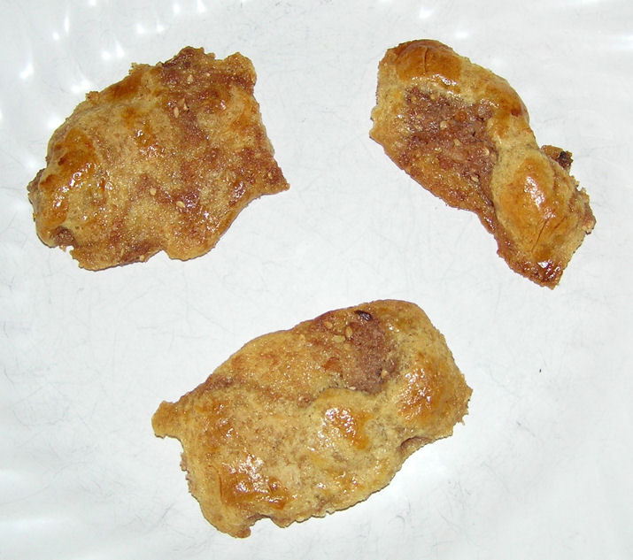 Gai zai crackers, Gaizai crackers